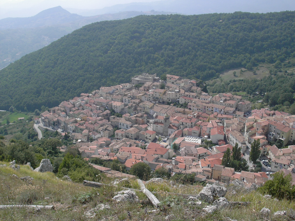 Panorama di Miranda dalle Coste (IS) - Italy